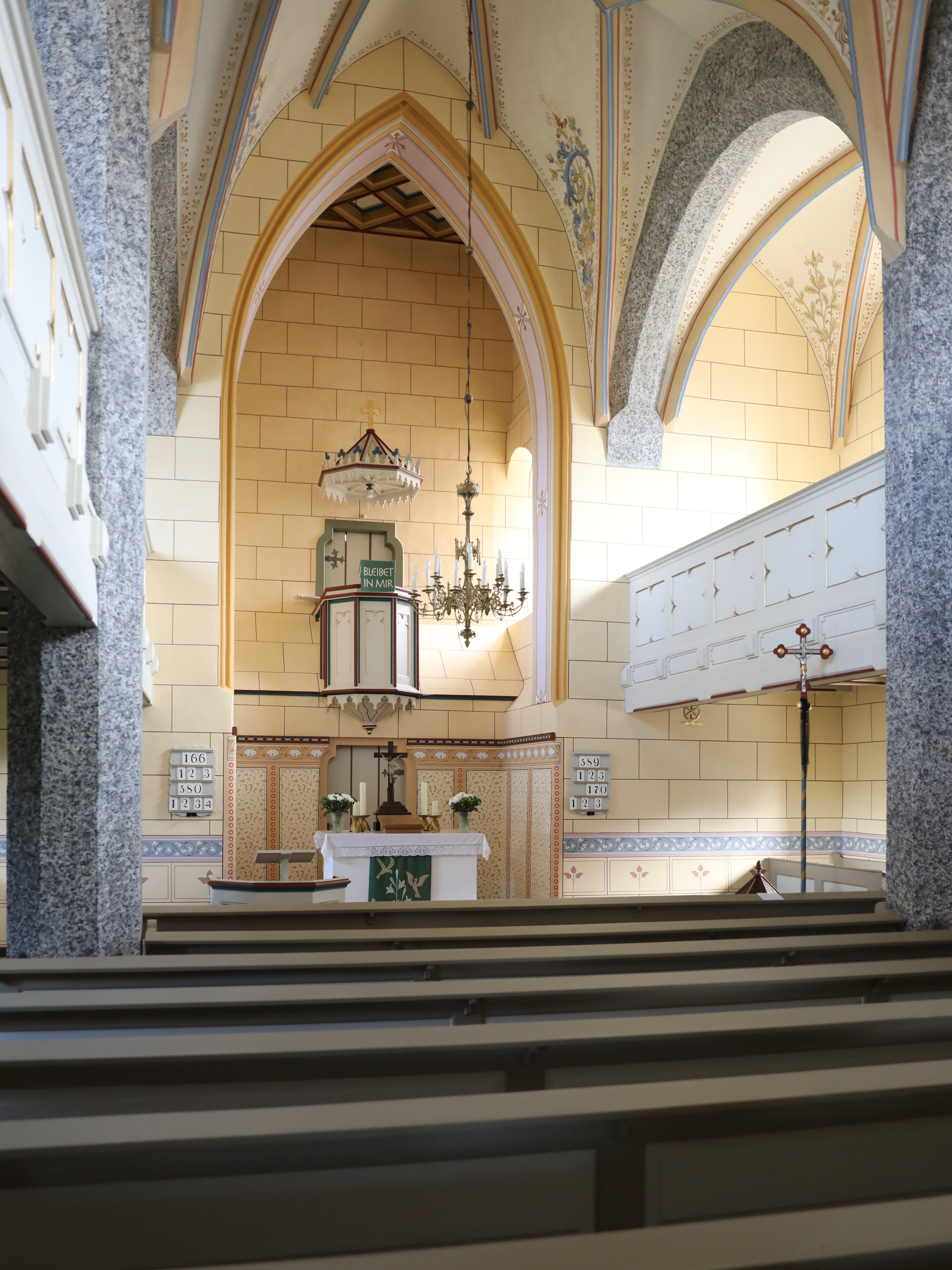 Evangelisch-lutherische Kirche St. Marien in Poppenhausen, 1858. Tag des offenen Denkmals.